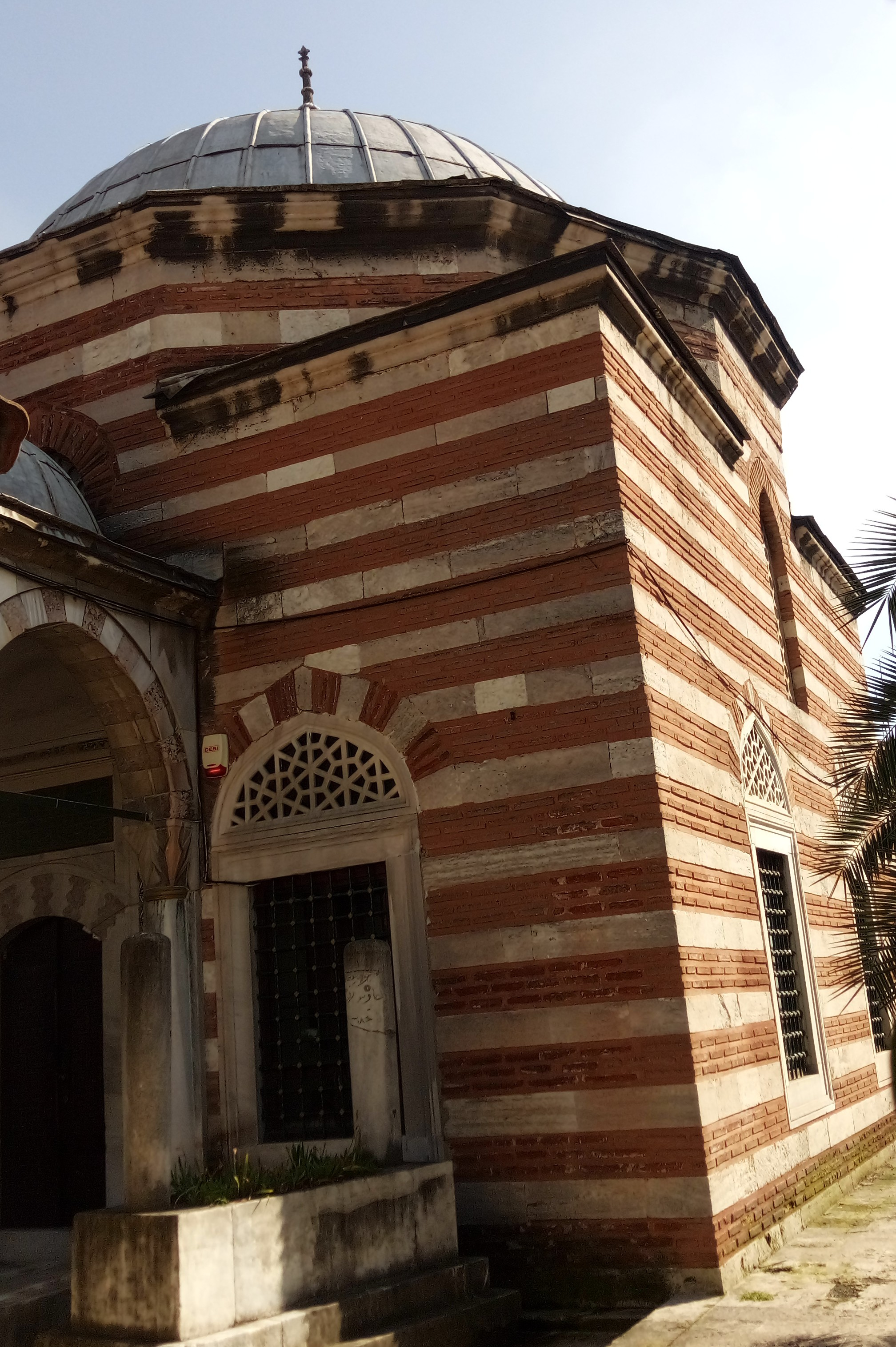 Eyüp Sultan'da, Camii Kebir Caddesi Üzerinde, Sokullu Mehmet Paşa Daru'l Kurrası